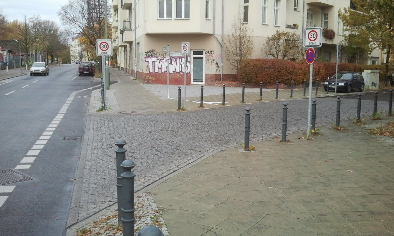 Berlin, Schoeneberg, my own photo